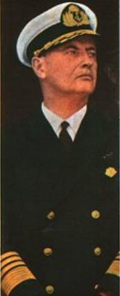 Almirante Benigno Ignacio Marcelino Varela